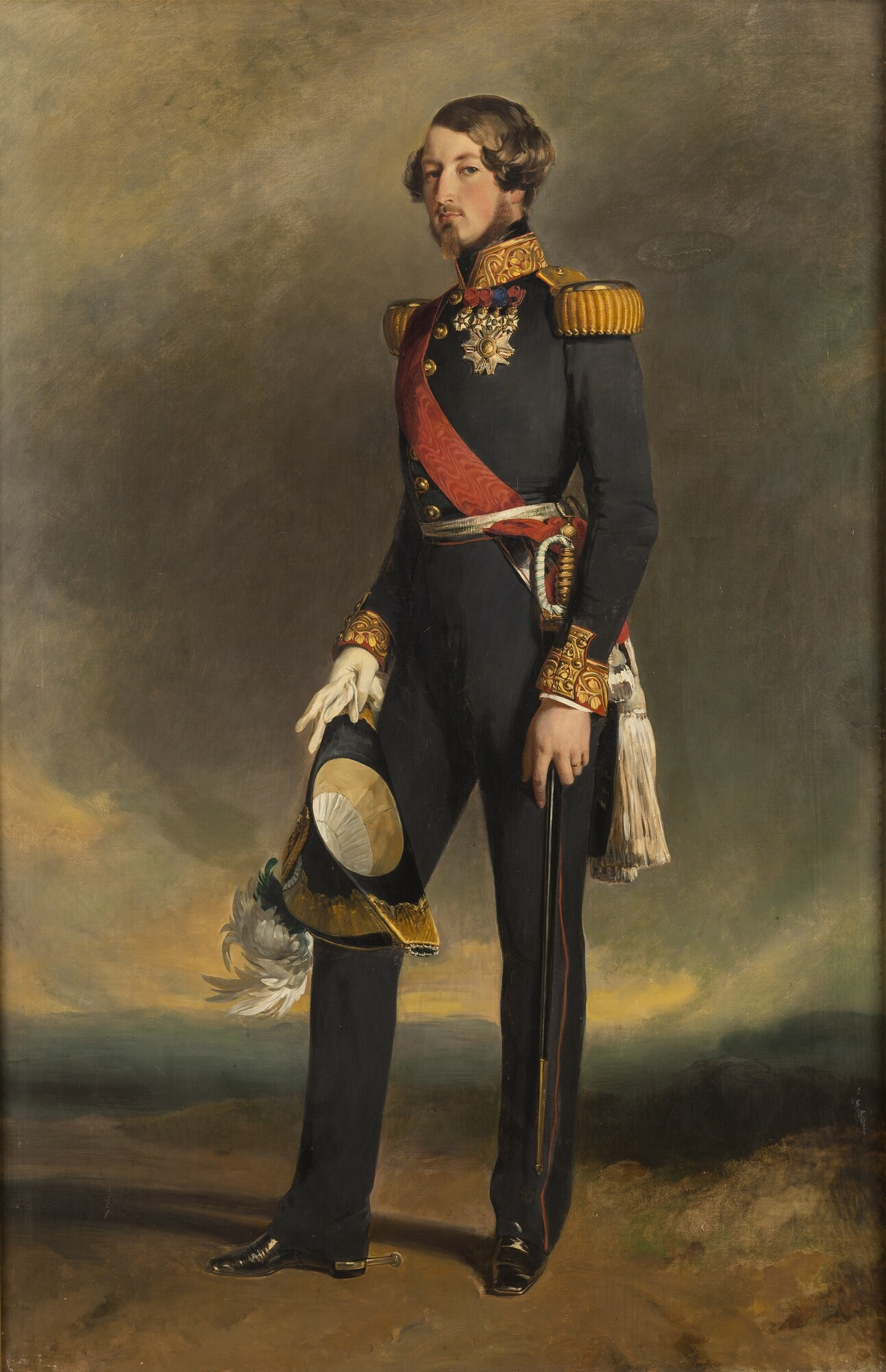 Auguste-Louis-Victor de Saxe-Cobourg-Kohary, prince de Saxe-Cobourg.